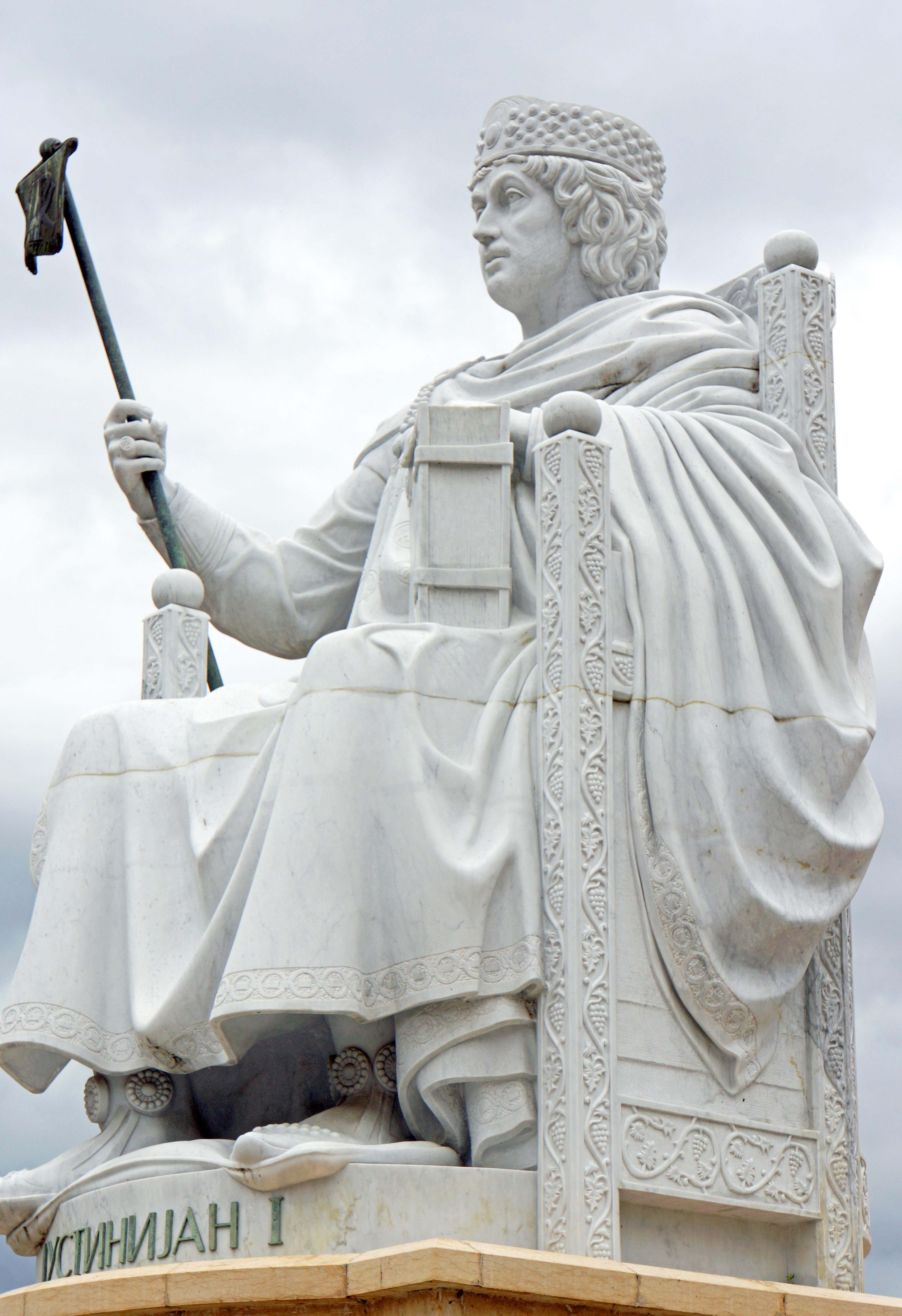 Skopje, Macedonia